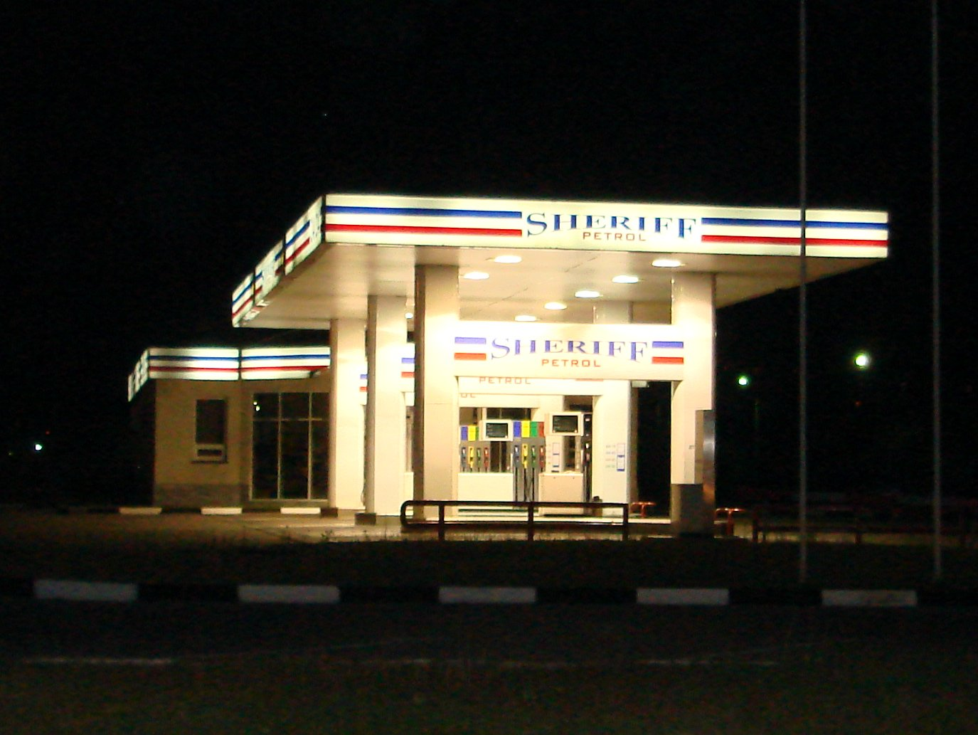 Автозаправка "Шериф" при въезде в Тирасполь